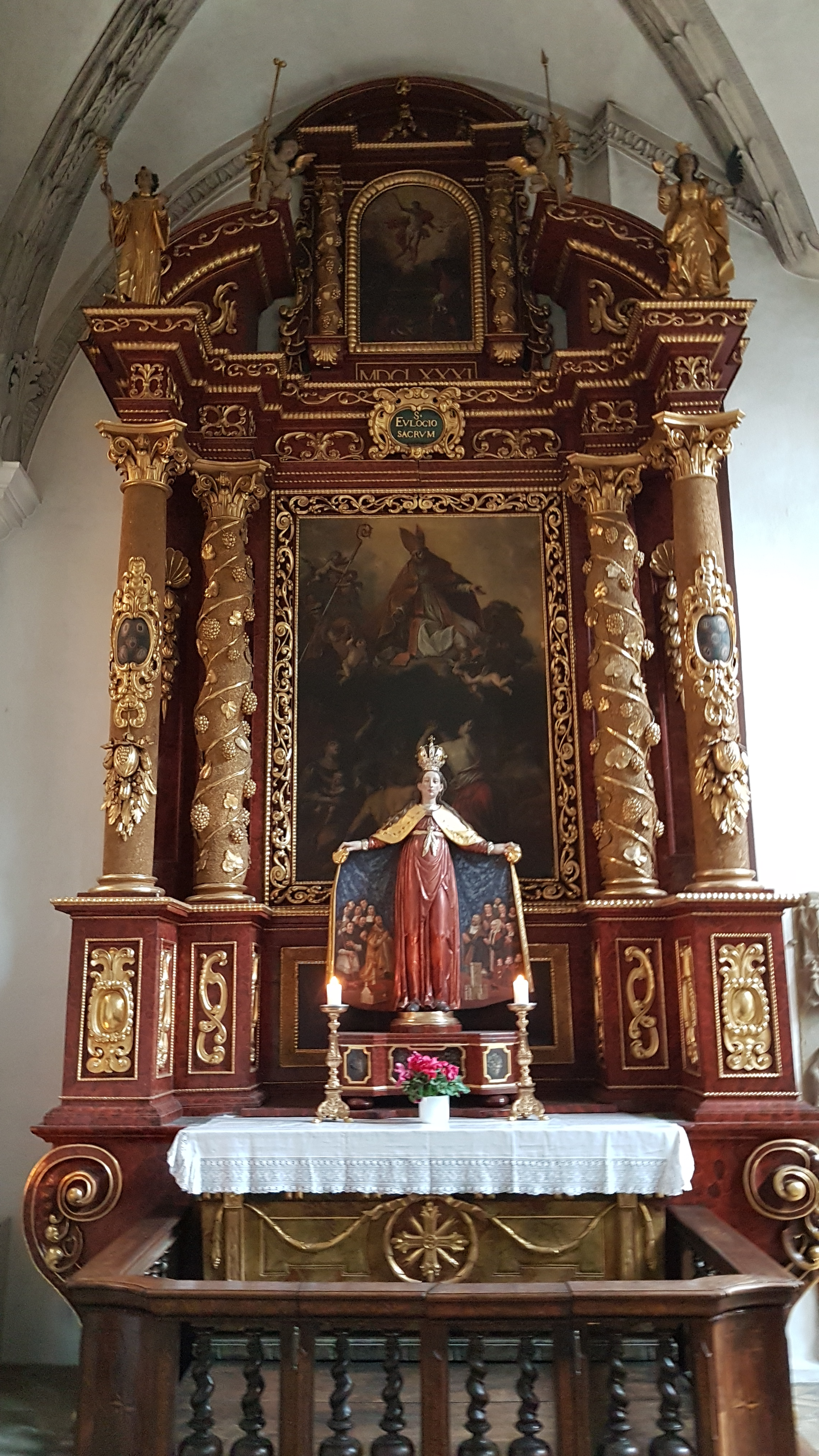 Mariä Himmelfahrt (Landsberg am Lech), linker großer Seitenaltar (Sebastiansaltar).